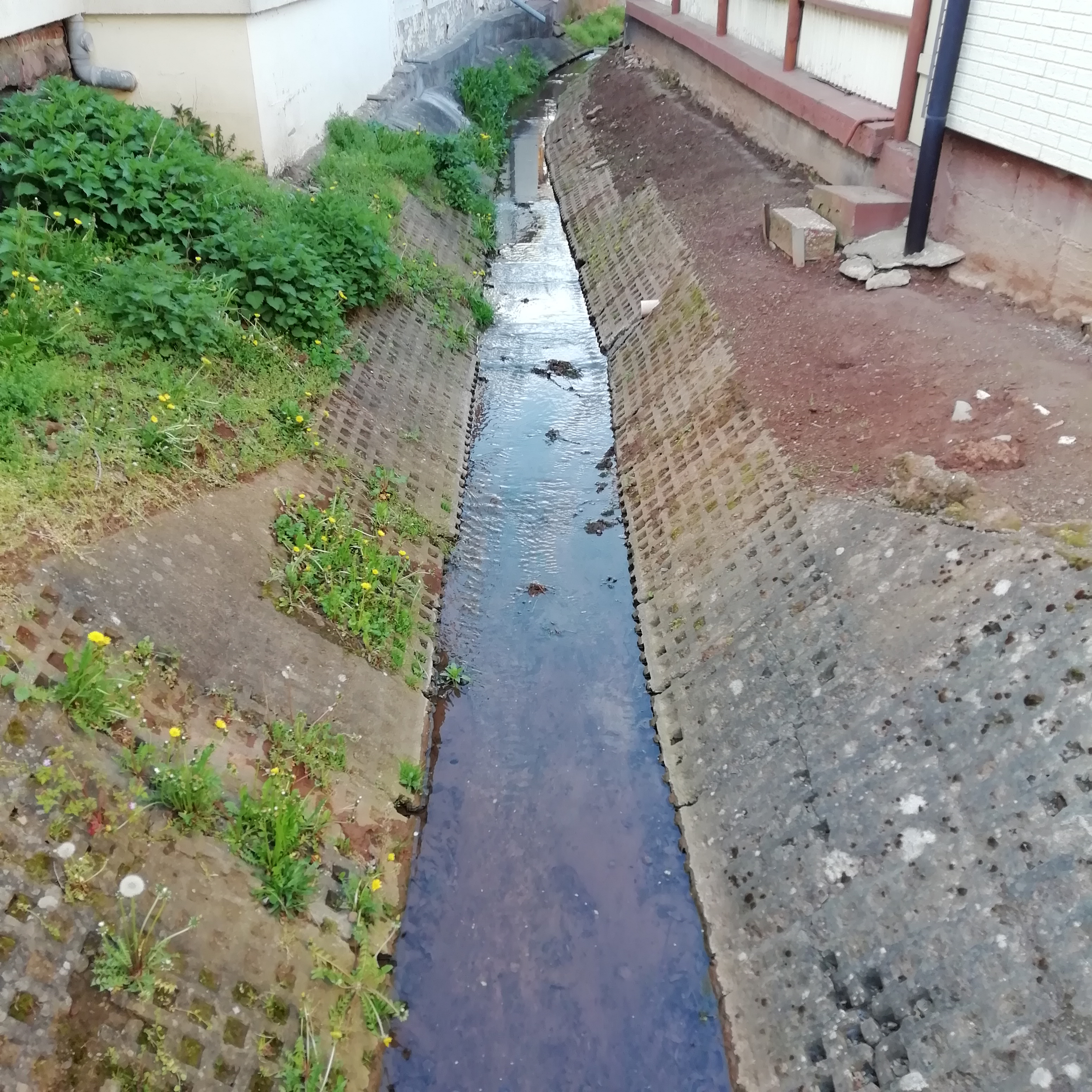 Der kanalisierte Ostergraben in Kleinwechsungen, Gemeinde Werther, Thüringen.